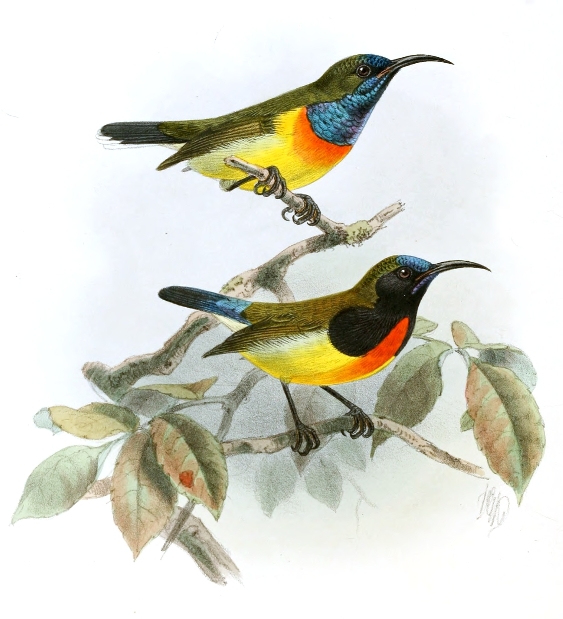 Cinnyris jugularis aurora , Aethopyga flagrans